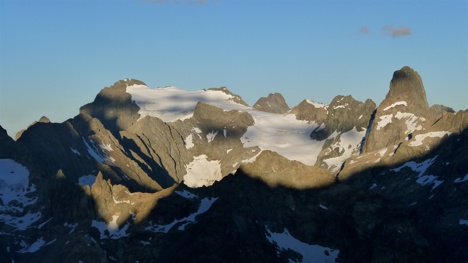 Rouies e Pointe du Vallon des Etages visti dal Vallon de la Temple - Massiccio degli Écrins